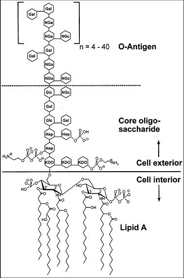 lipopolysaccharide